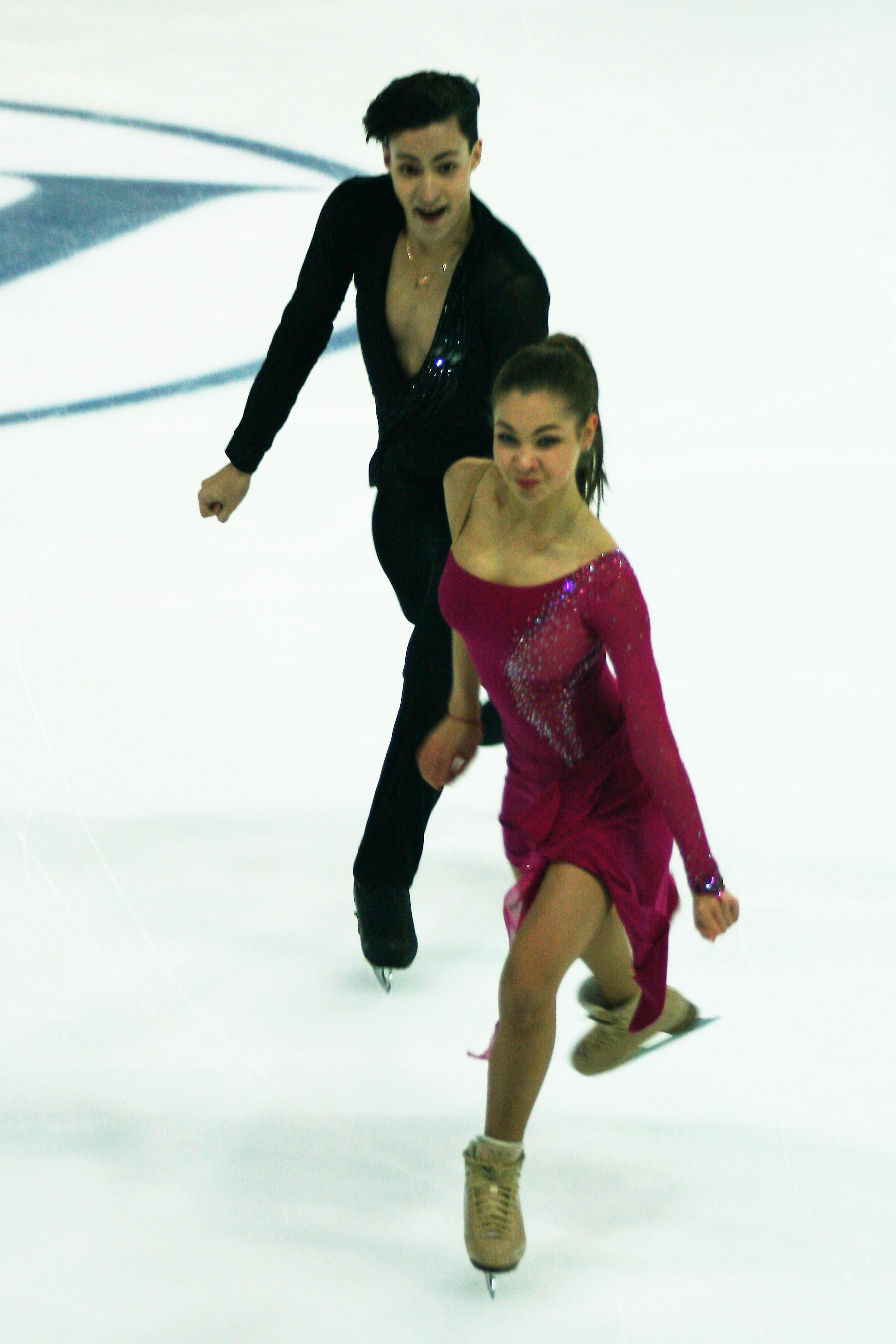 Анастасия Шпилевая / Григорий Смирнов (Россия) на финале Гран-при по фигурному катанию среди юниоров 2016-2017